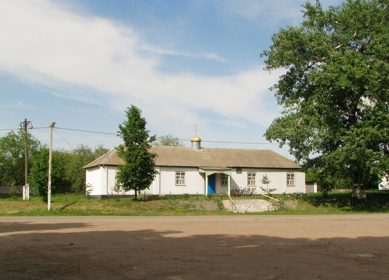 Храм Успіння Пресвятої Богородиці (УПЦ КП). Село Марківці, Бобровицький район, Чернігівська область.